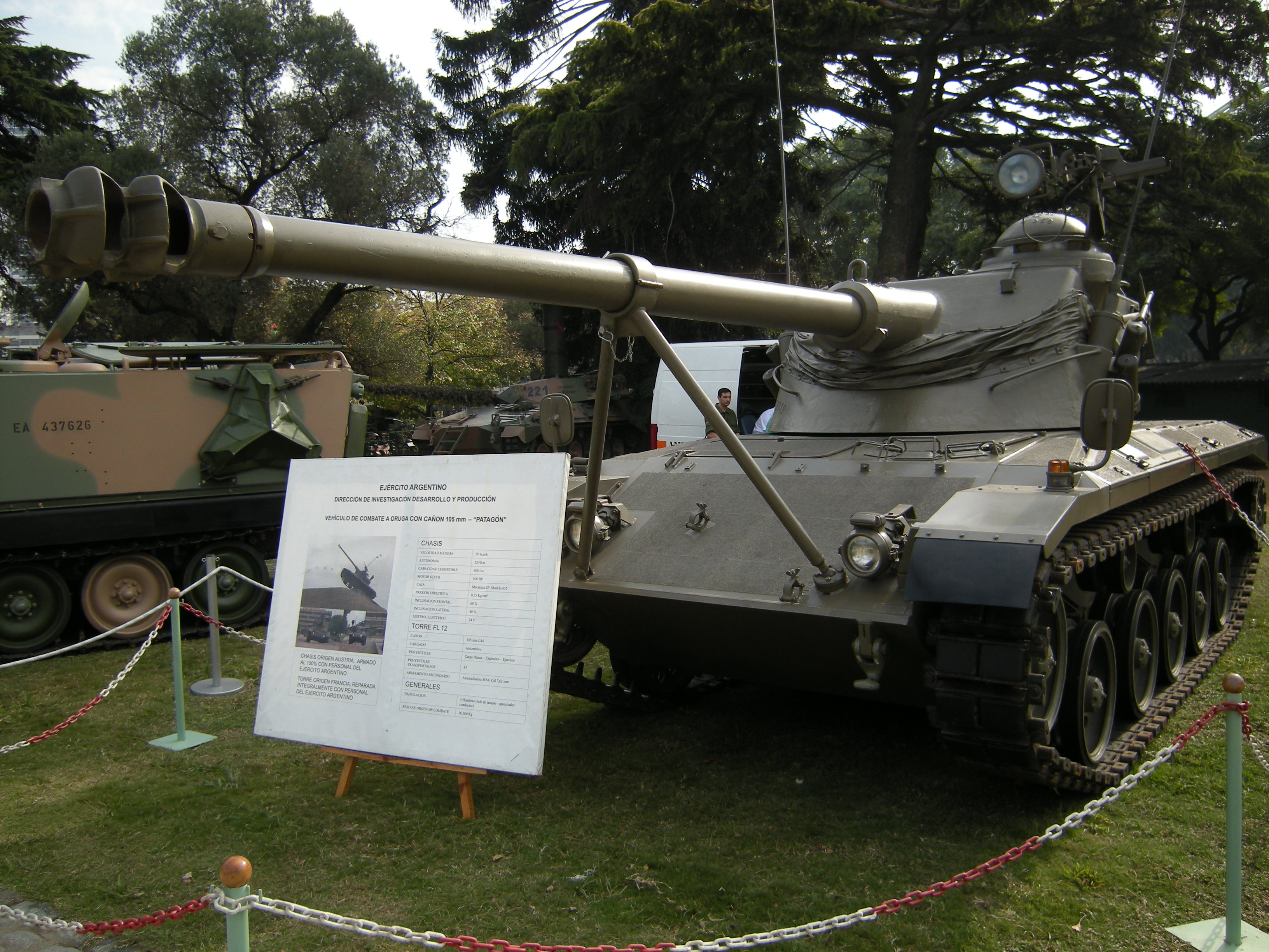 VC Tan Patagón, durante la Exposición del Ejército Argentino realizada en mayo de 2008